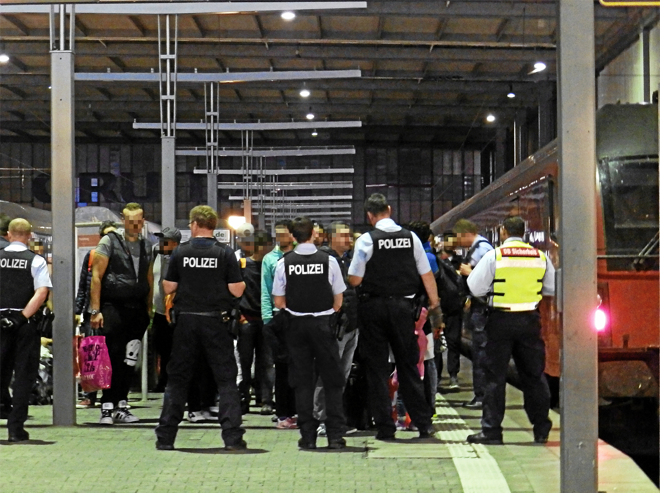 Polizei fängt Flüchtlinge am Münchner Hauptbahnhof ab. Das Foto wurde am 12. September 2015 aufgenommen